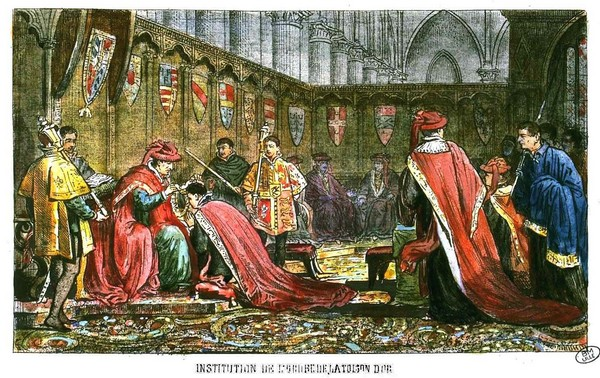 Bibliothèque municipale de Lille, 44214, planche 3 Boldoduc, Edouard Institution de l'ordre de la Toison d'or